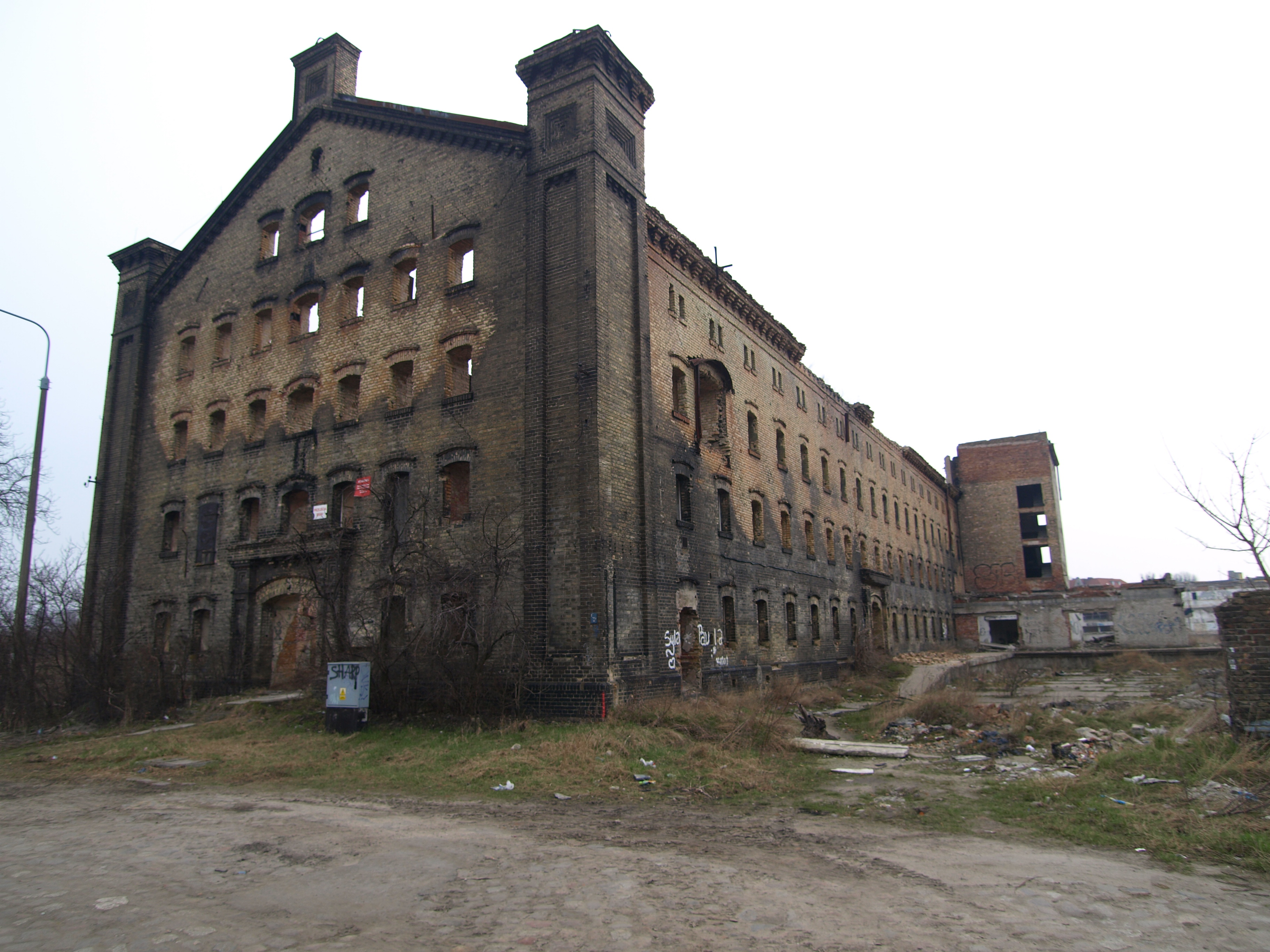 Gdańsk Długie Ogrody - jeden z budynków (dawny spichlerz zbożowy) zabytkowego zespołu rzeźni przy ul. Angielska Grobla 19.